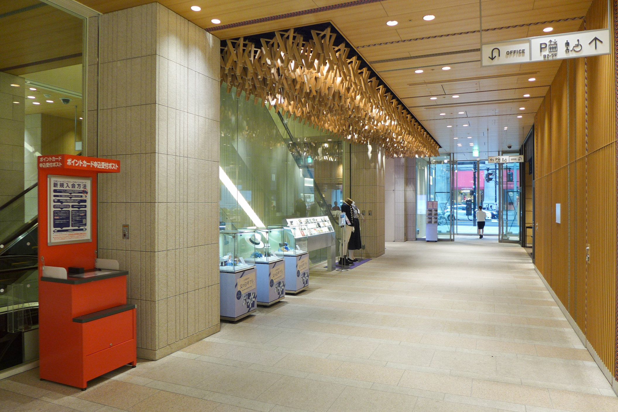 Coredo Muromachi 3 Level 1